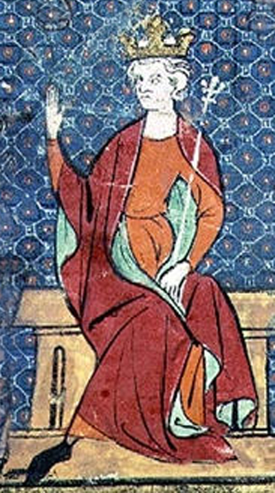 Childeric II.